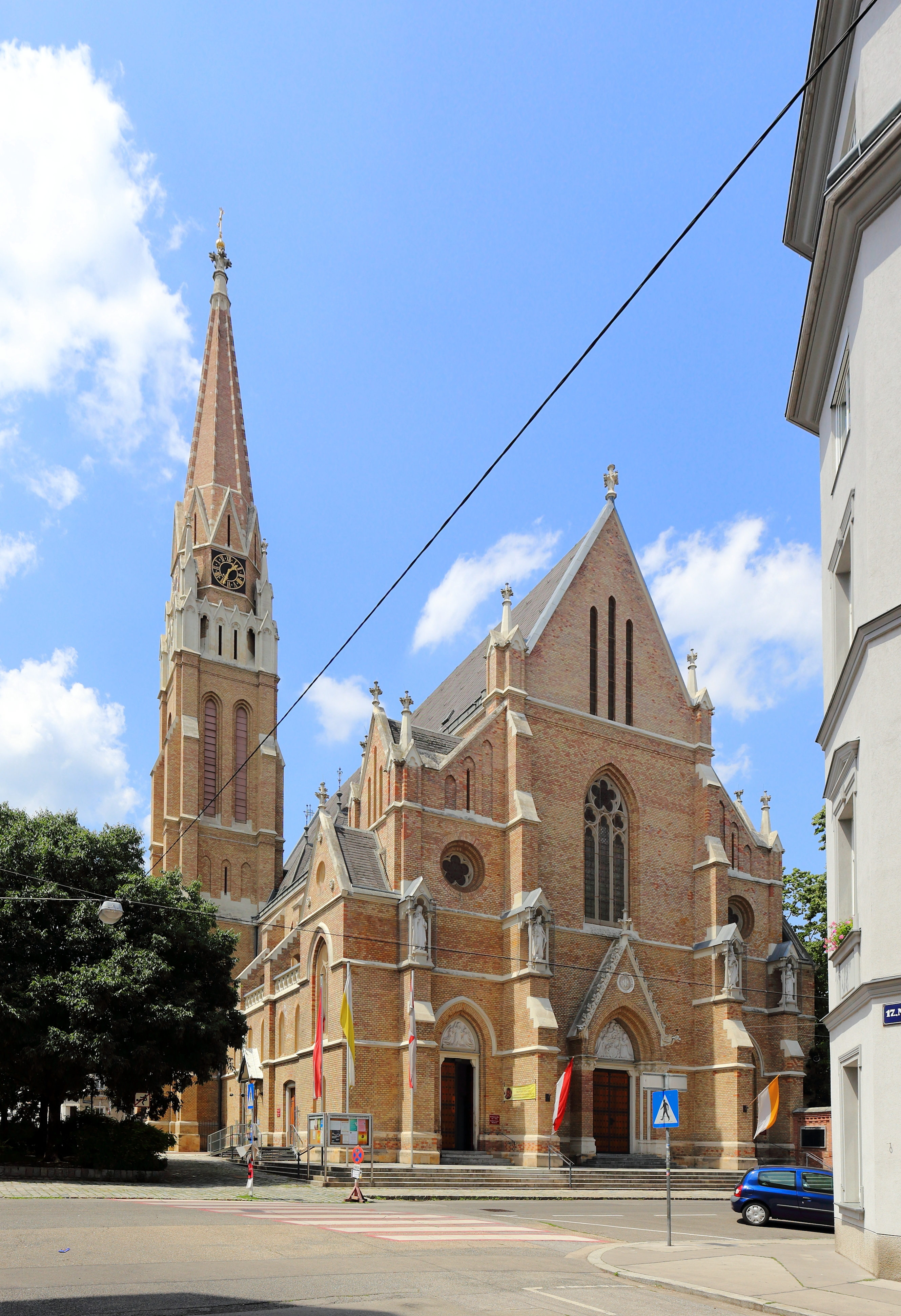 Südostansicht der Marienkirche „Zu Unserer lieben Frau von der Immerwährenden Hilfe“, eine Pfarr- und Klosterkirche im 17. Wiener Gemeindebezirk Hernals..Ursprünglich als Klosterkirche der Redemptoristen von 1886 bis 1889 nach Plänen von Richard Jordan errichtet. Durch die Errichtung der Marienpfarre im Jahr 1937 erhielt sie auch den Status einer Pfarrkirche. Die in Sichtziegelbauweise und neugotischen Stil errichtete Kirche ist 42,60 m lang, 20 m breit und 20,80 m hoch. Der Turm an der linken Seite der Kirche hat eine Höhe von 61 m.